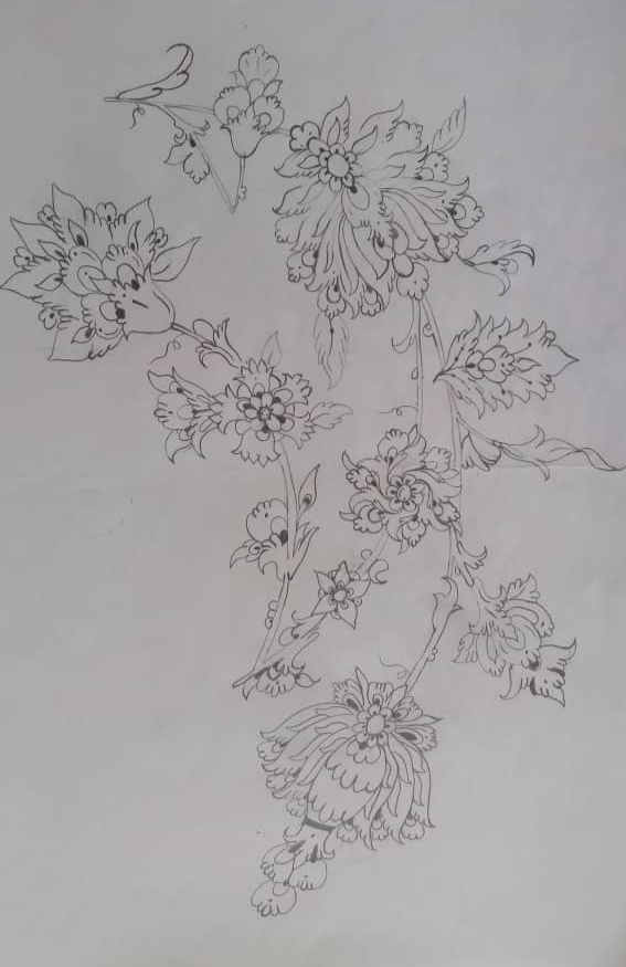 استفاده از نقوش برگ ،گل و ساقه درطراحی سنتی